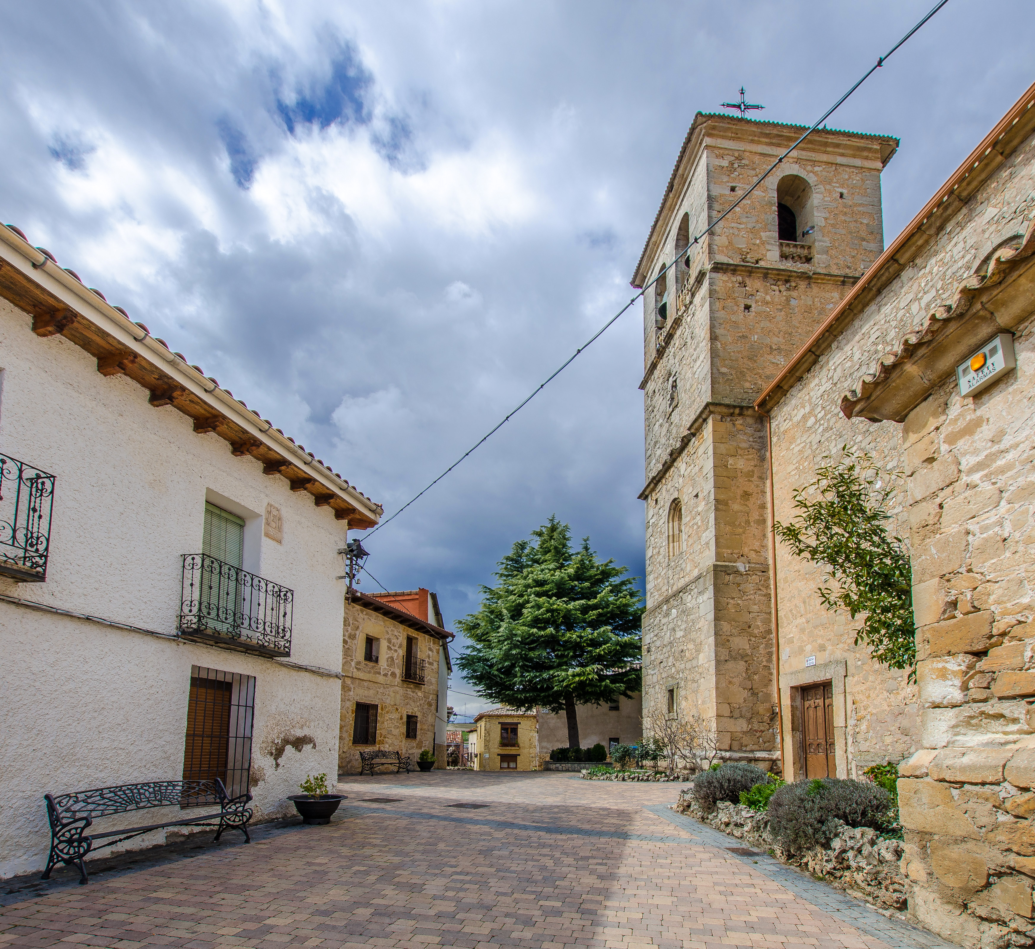 Iglesia de San Benito desde la plaza de Marcelo Esteban.